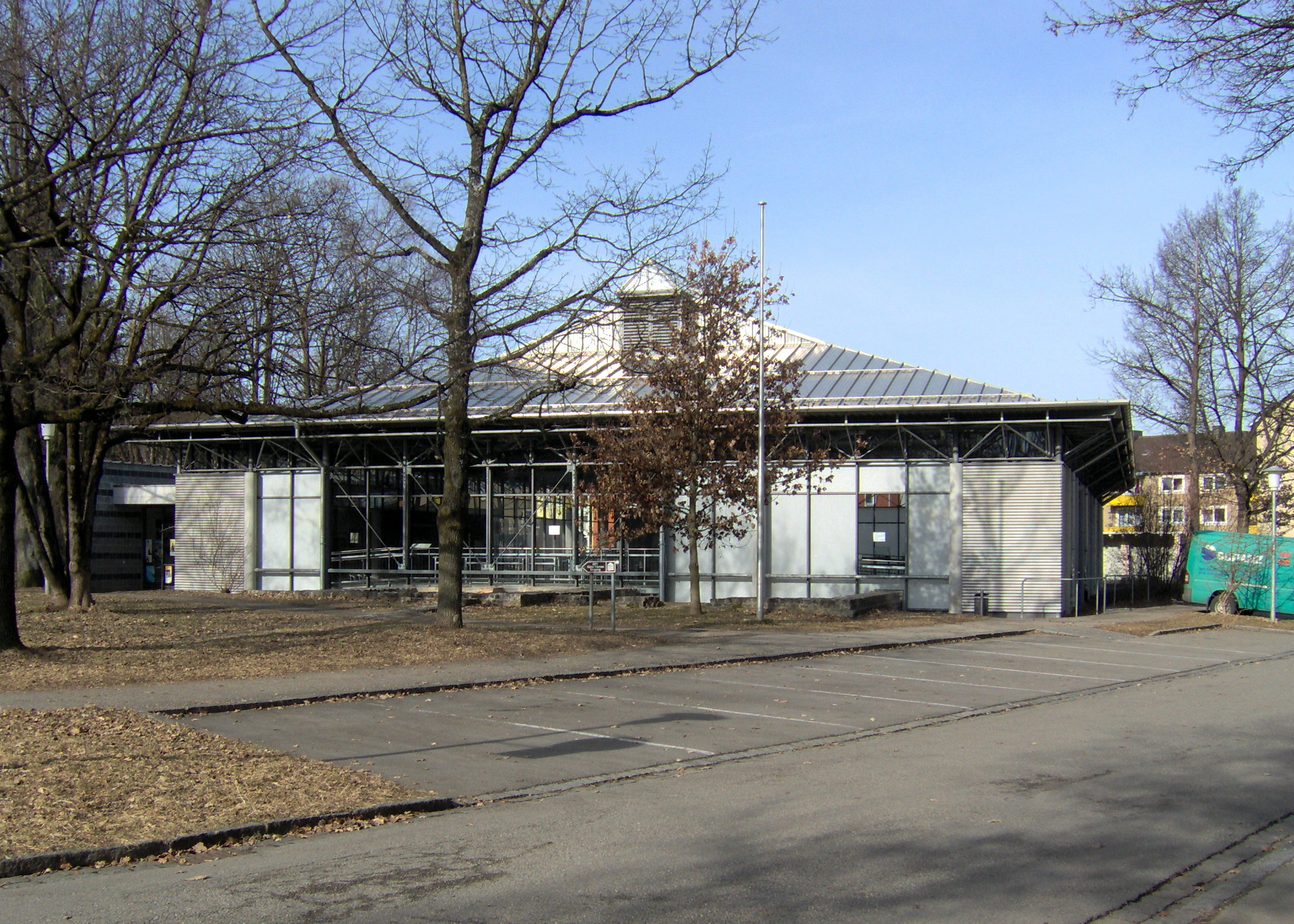 Das Schutzgebäude über den kleinen Thermen der römischen Siedlung Cambodunum (Kempten/Allgäu) nach Nord-West fotografiert